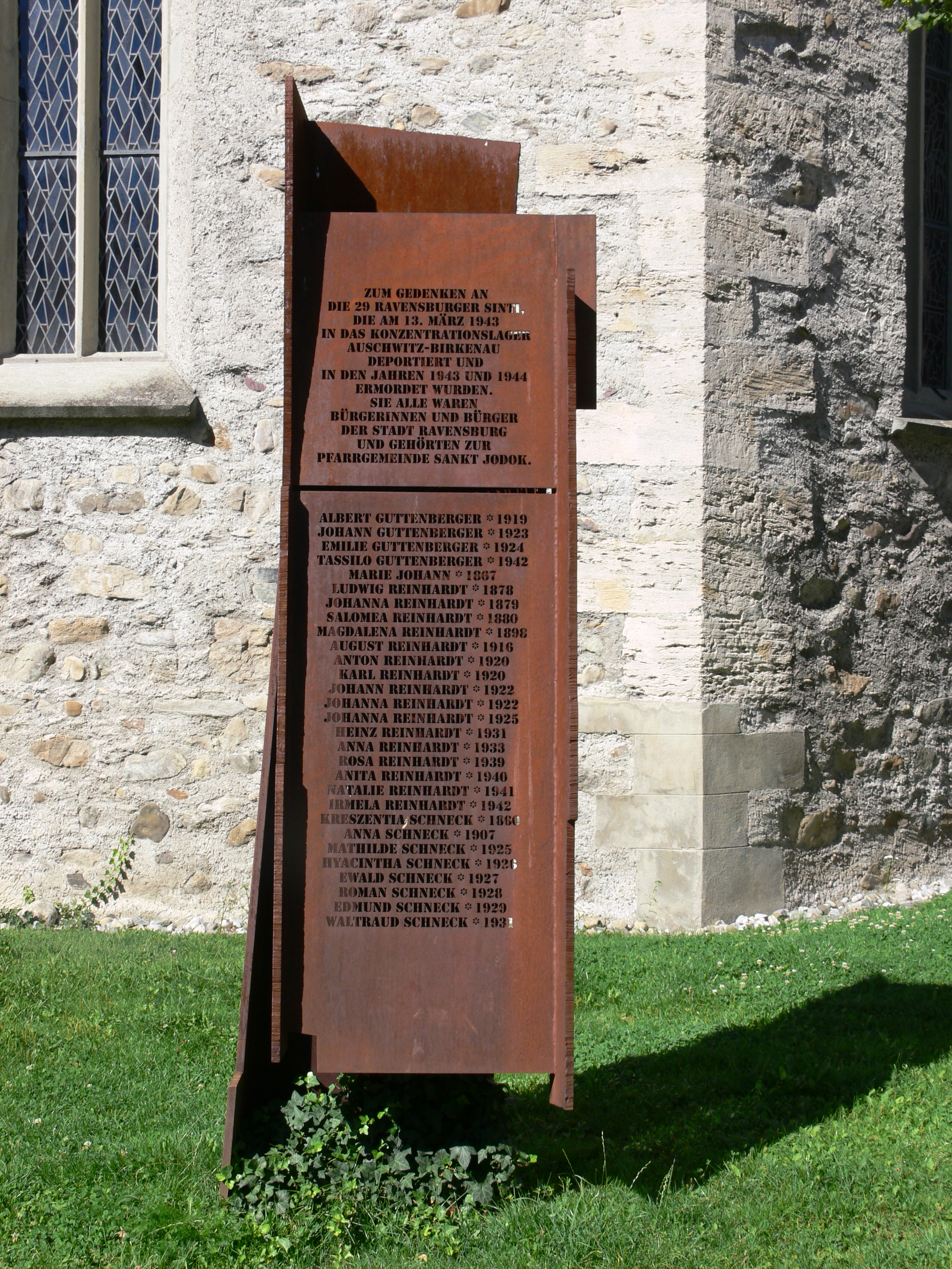 Mahnmal zum Gedenken an die 29 Ravensburger Sinti, die im KZ Auschwitz-Birkenau ermordet wurden (siehe auch Porajmos); aufgestellt vor der Pfarrkirche St. Jodok, zu deren Pfarrei sie gehörten; Bildhauer: Reinhard Scherer, Alfdorf